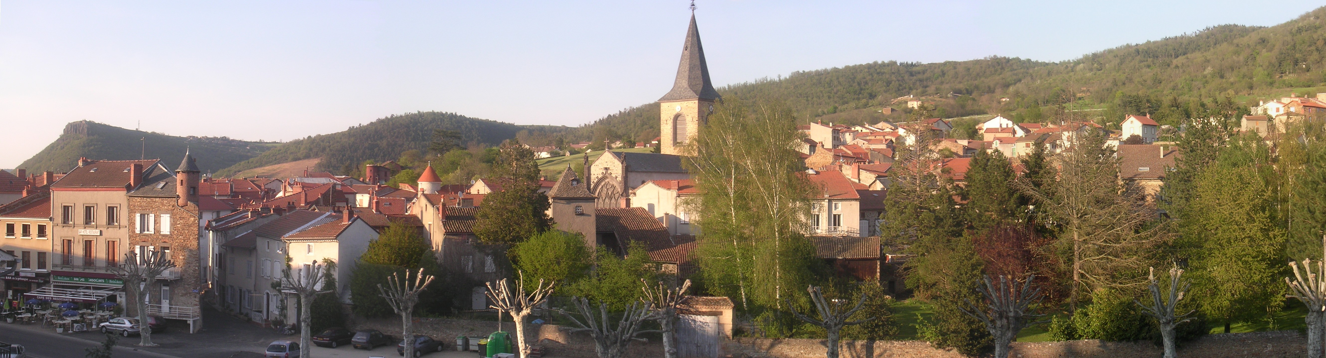 La vieille ville de Massiac